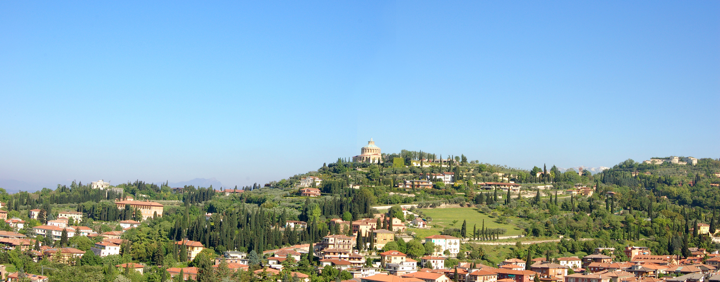 Fotografia di parte delle colline che circondano Verona, con i tre forti Sofia, San Mattia, e l'ex forte San Leonardo